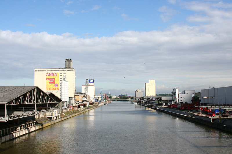 Der West- und Mittelkai des Stuttgarter Neckarhafens